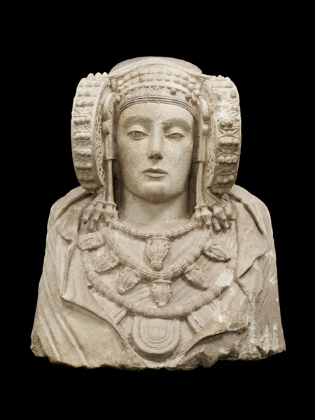 Dama de Elche (Cultura Ibérica). Número de inventario: 26207.